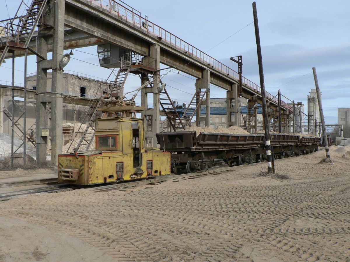 Электровоз К14М-091 с грузовыми вагонами на территории комбината, УЖД Тверского КСМ №2